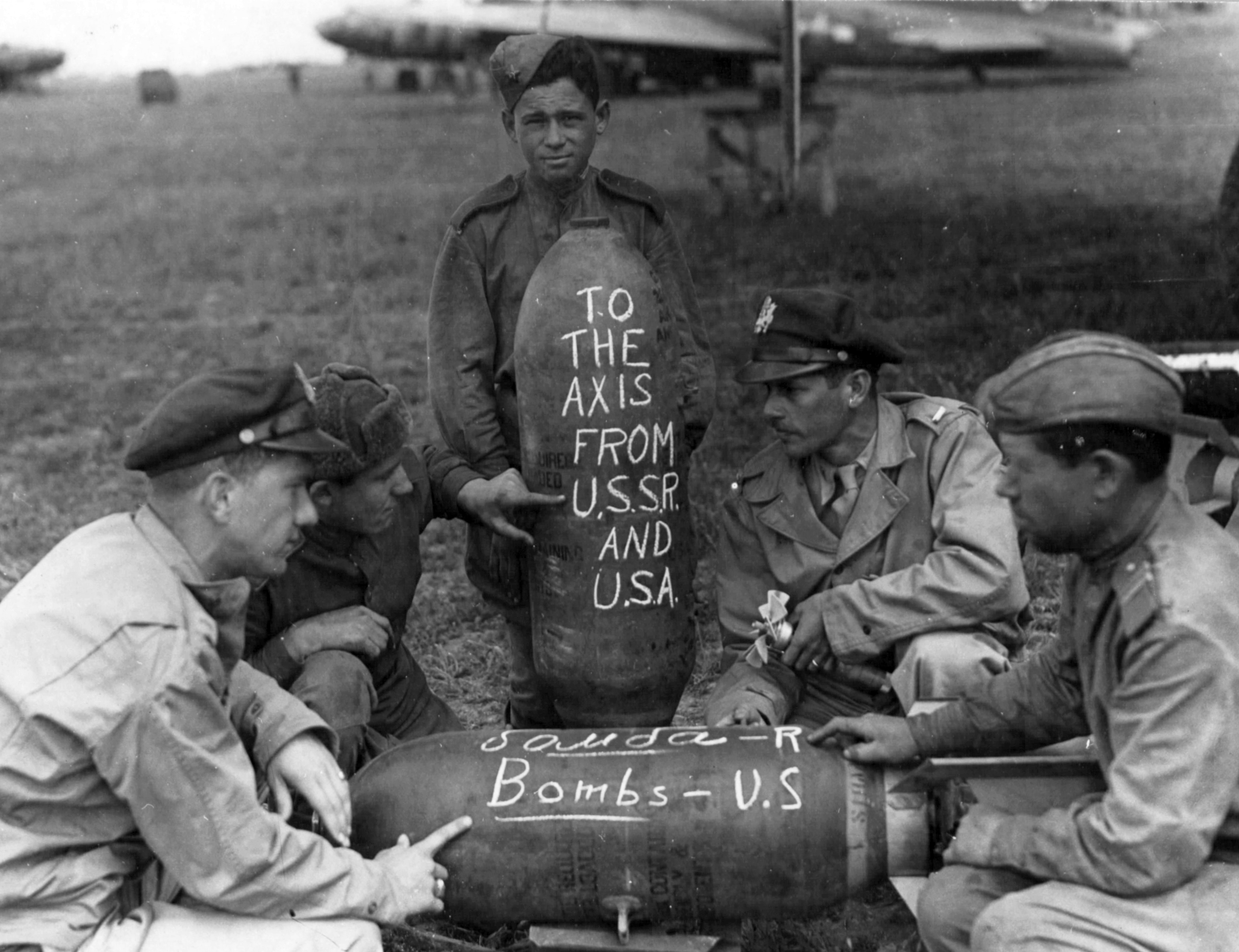 amerikai és orosz katonák 1944-ben a FRANTIC hadművelet idején. A háttérben egy B-17 Flying Fortress bombázógép és egy C-47 Dakota szállítógép látható. Location: Ukraine Tags: Soviet Union, second World War, soldier, eastern front, airport, American soldier Title: amerikai és orosz katonák 1944-ben a FRANTIC hadművelet idején. A háttérben egy B-17 Flying Fortress bombázógép és egy C-47 Dakota szállítógép látható.